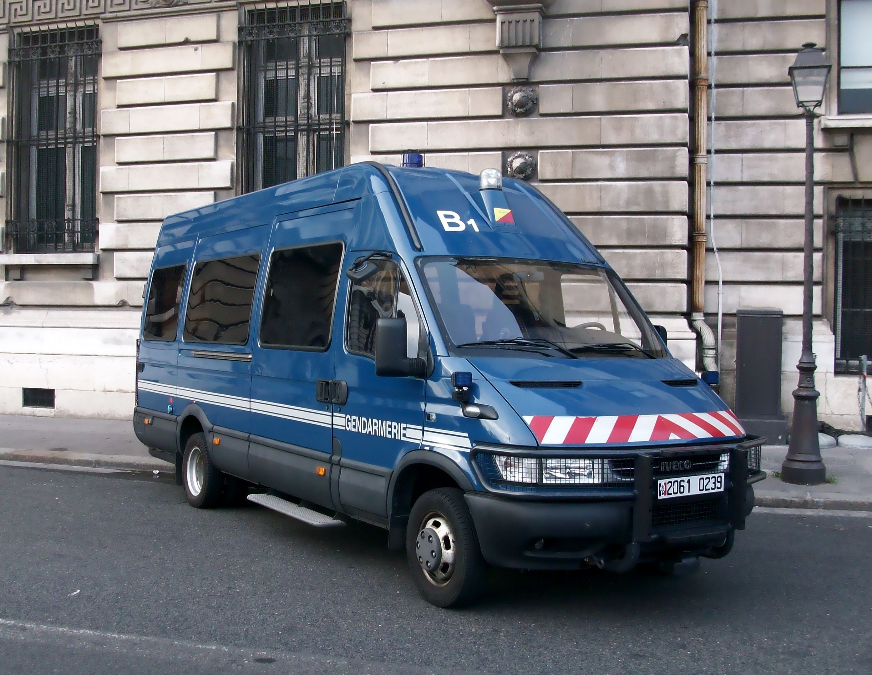 Camionnette de la gendarmerie mobile à Paris